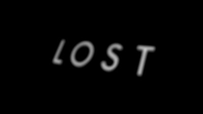 Logo der Fernsehserie Lost